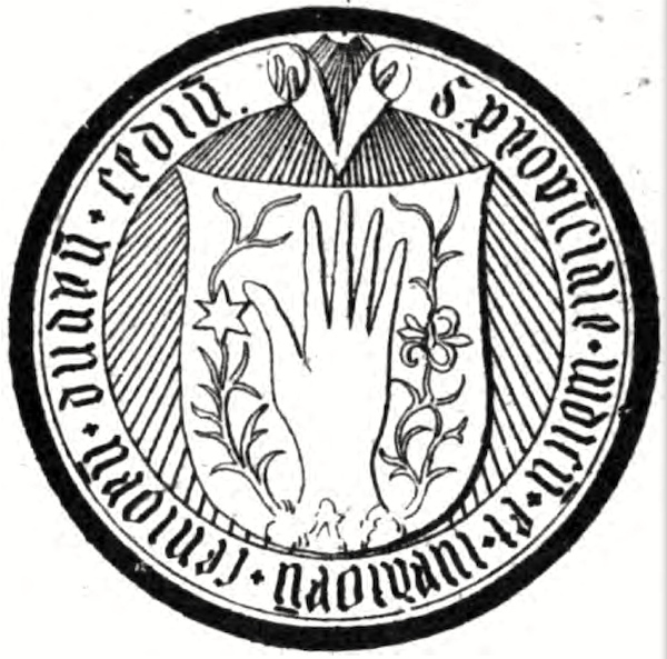 Siegel der Zwei Stühle Mediasch und Schelk aus dem Jahr 1492. Umschrift: "s. provinciale iudicu et iuratoru senioru duaru sediu."